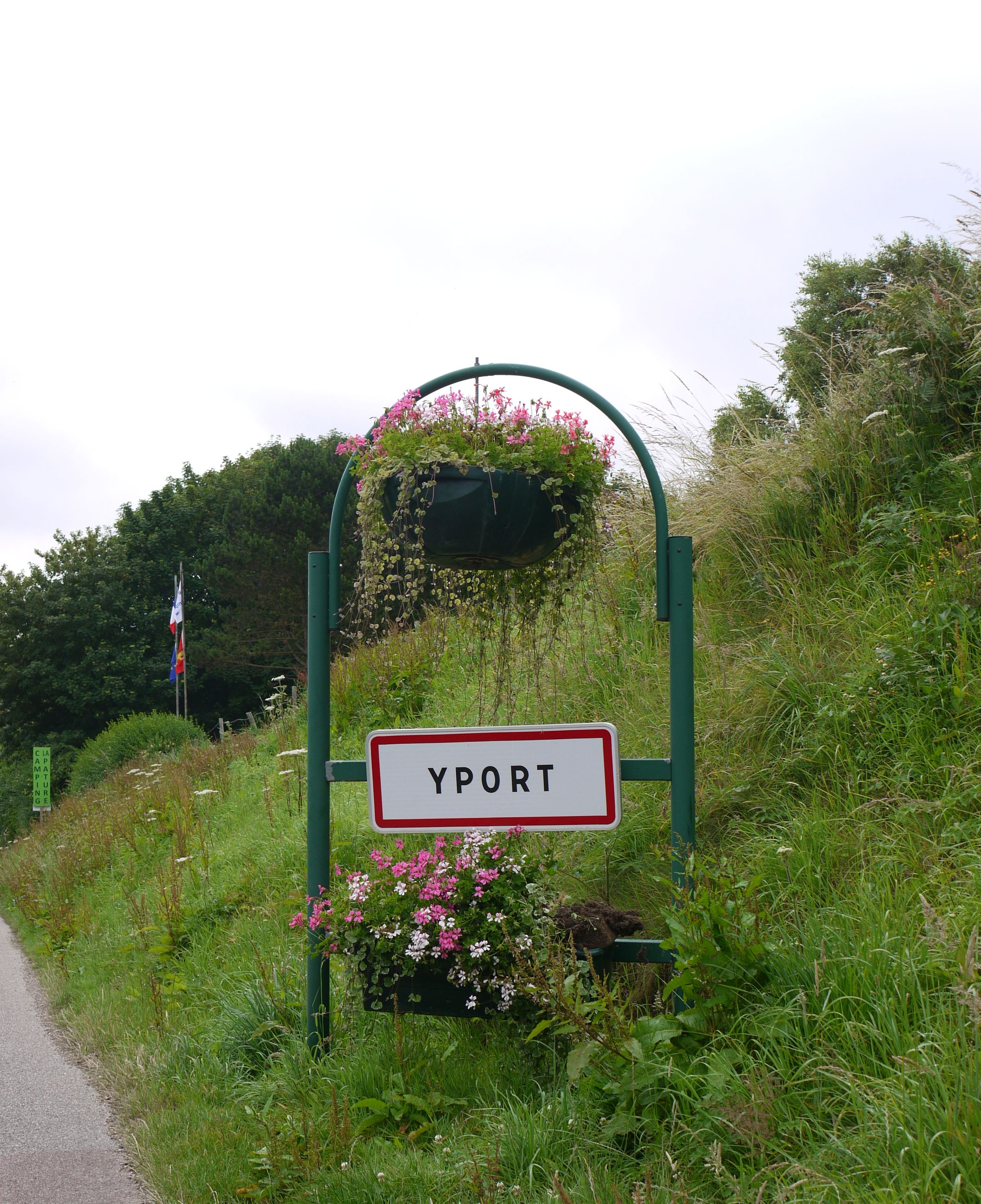 Panneau d'entrée à Yport